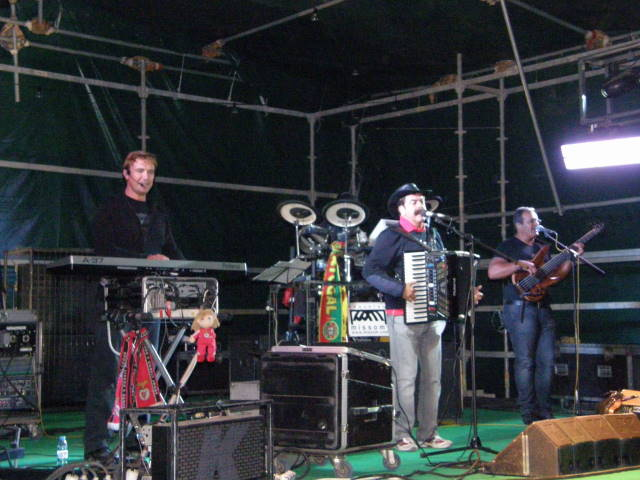 O ano de 2008 fica na história da aldeia do Pereiro por ter tido um concerto de Quim Barreiros, gratuito para toda a gente, a que assistiram largos milhares de pessoas...